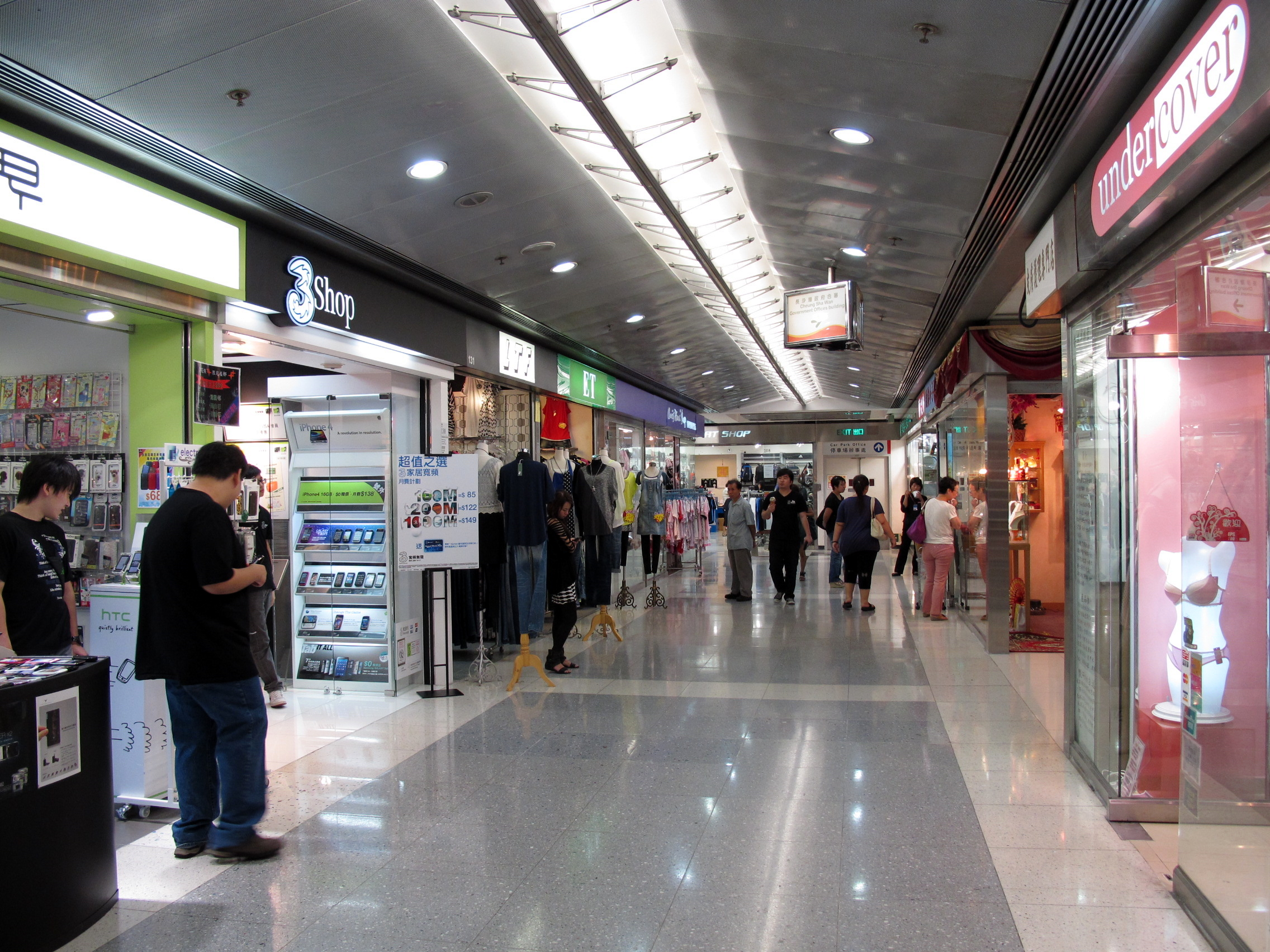 Dragon Centre Level 3 Access